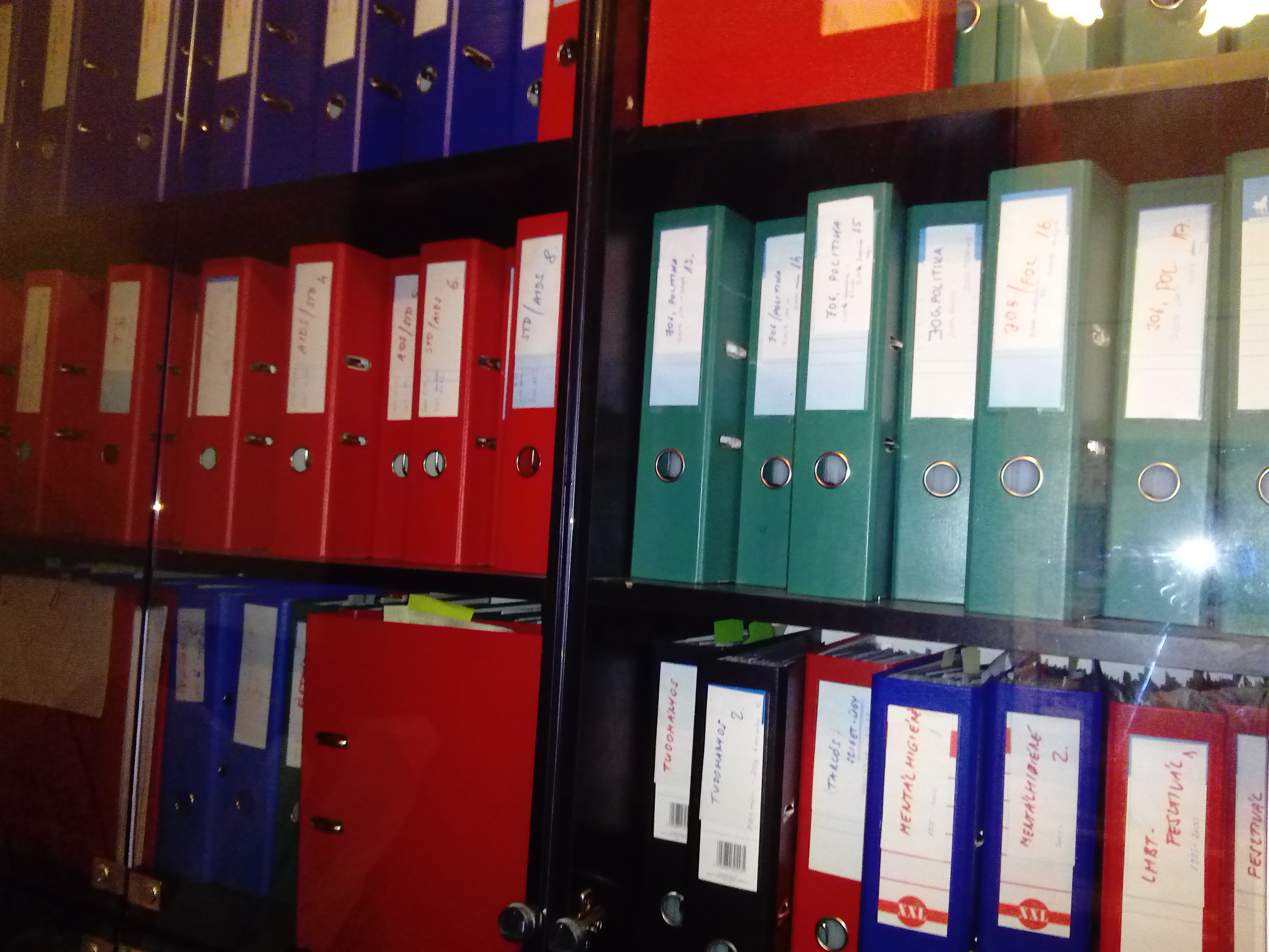 A Háttér Archívum nyomtatott cikkgyűjteménye